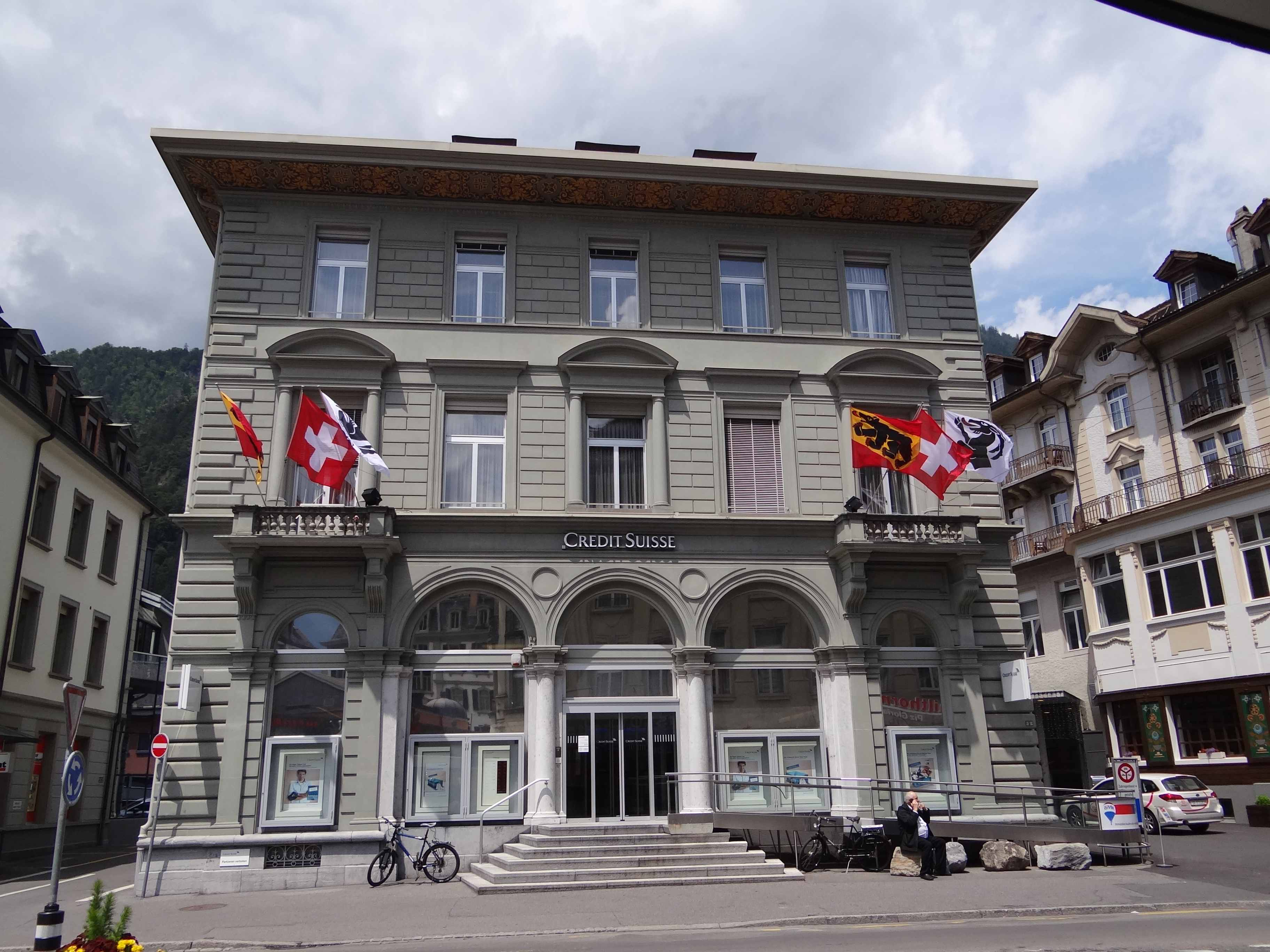 Credit Suisse